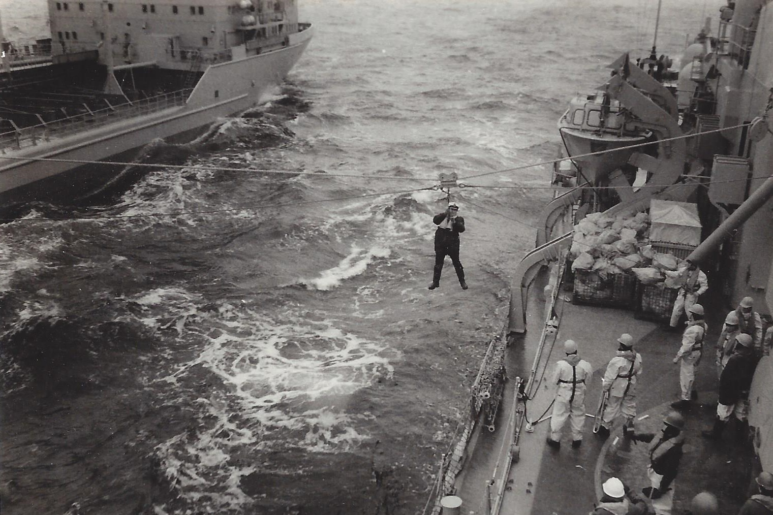 Personentransfer mit Highline auf Zerstörer Lütjens (D 185)